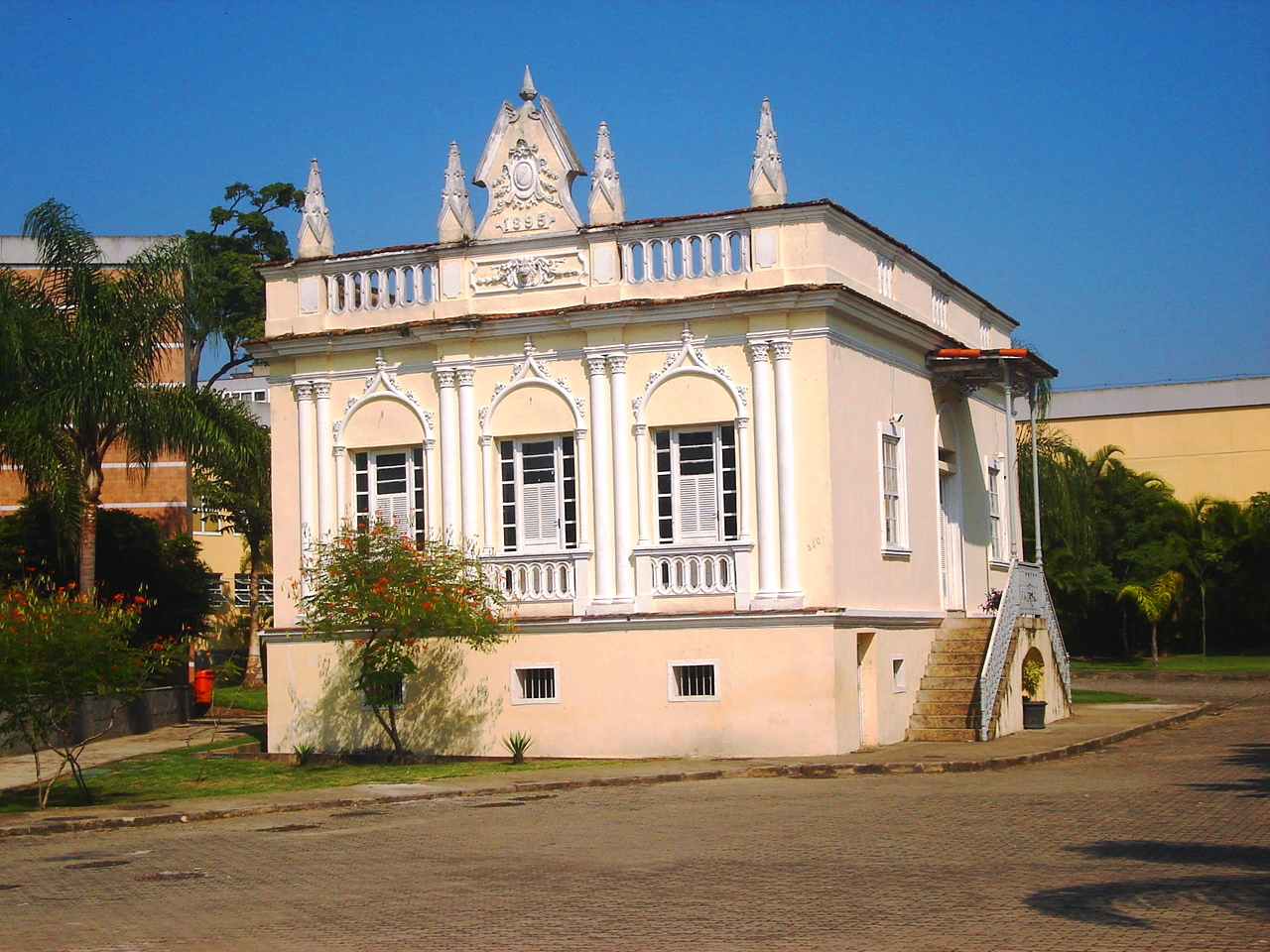 Solar dos Araújos em Santa Cruz, Rio de Janeiro, RJ